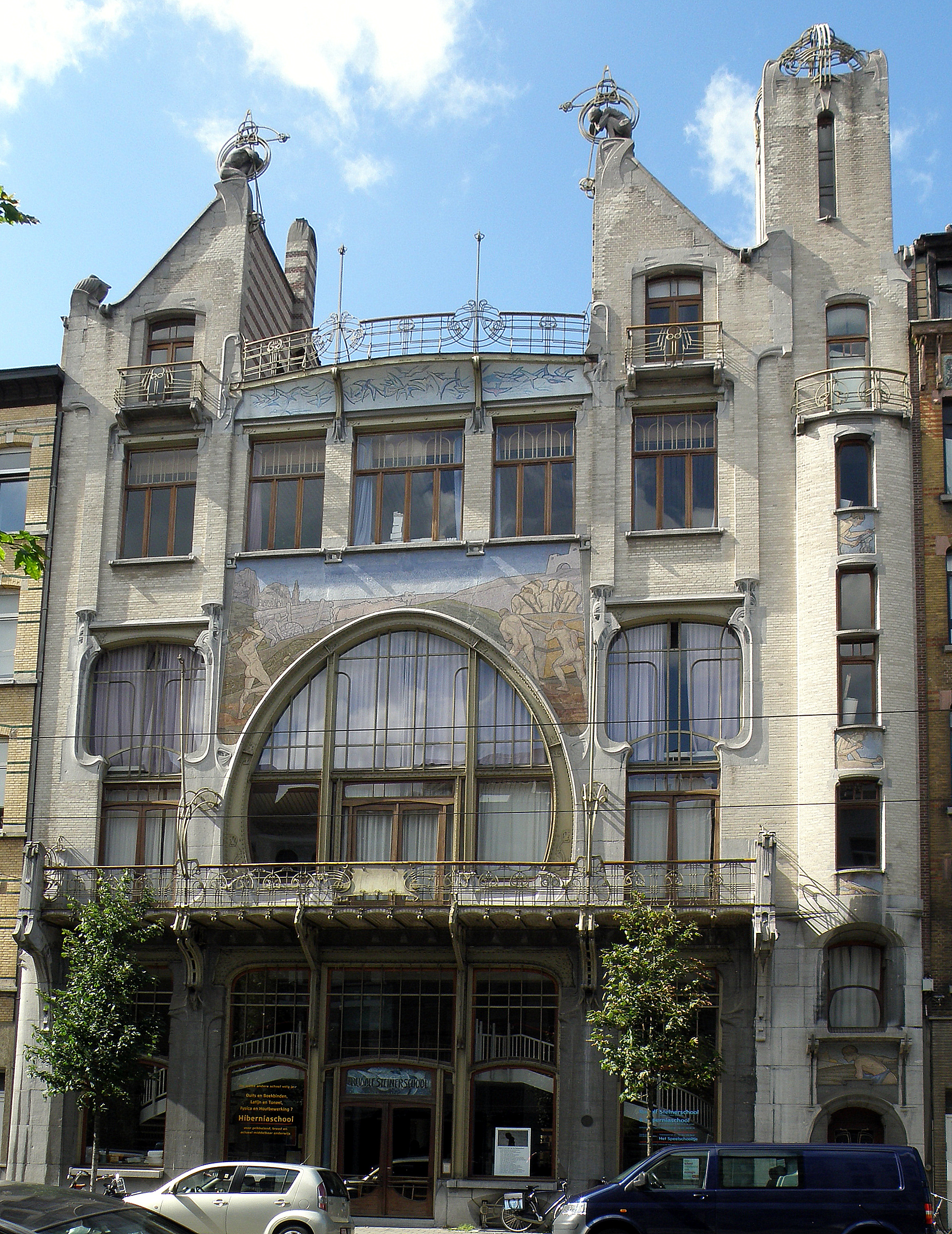 Antwerpen, België. Liberaal Volkshuis "Help U Zelve", aan de Volkstraat. Art nouveau-gebouw n.o.v. archit. Jan van Asperen en Emiel van Averbeke.